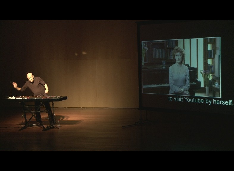 אבי בנימין ויבגניה דודינה במופע "פסקול חי לסרט שאינו קיים"